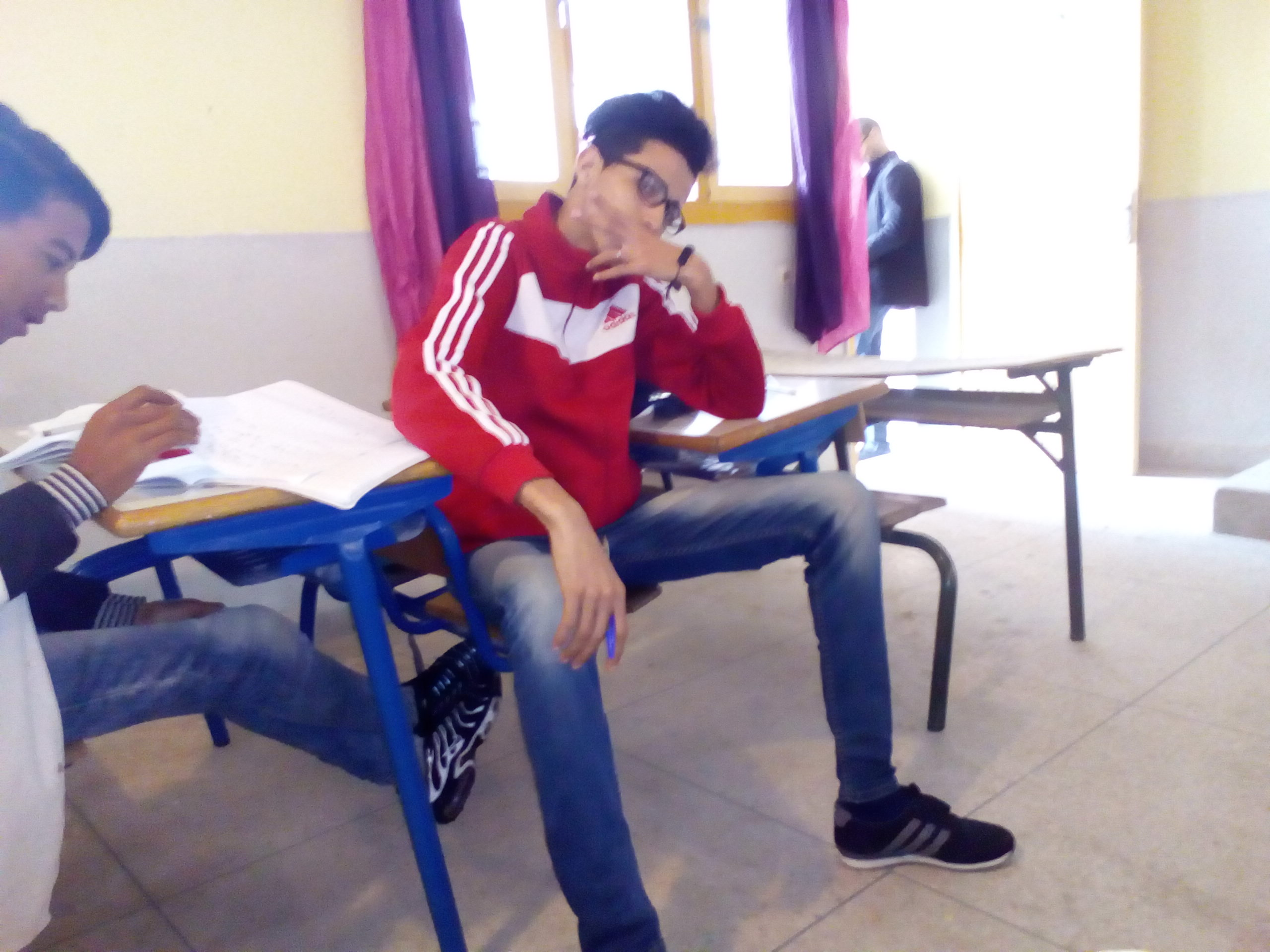 青少年